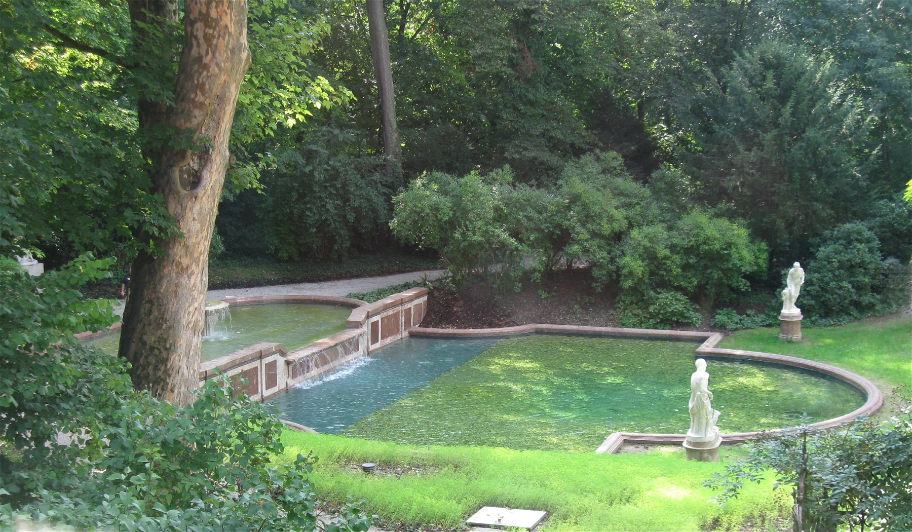 Schlosspark Nymphenburg, Südlicher Kabinettsgarten, Kleine Kaskade